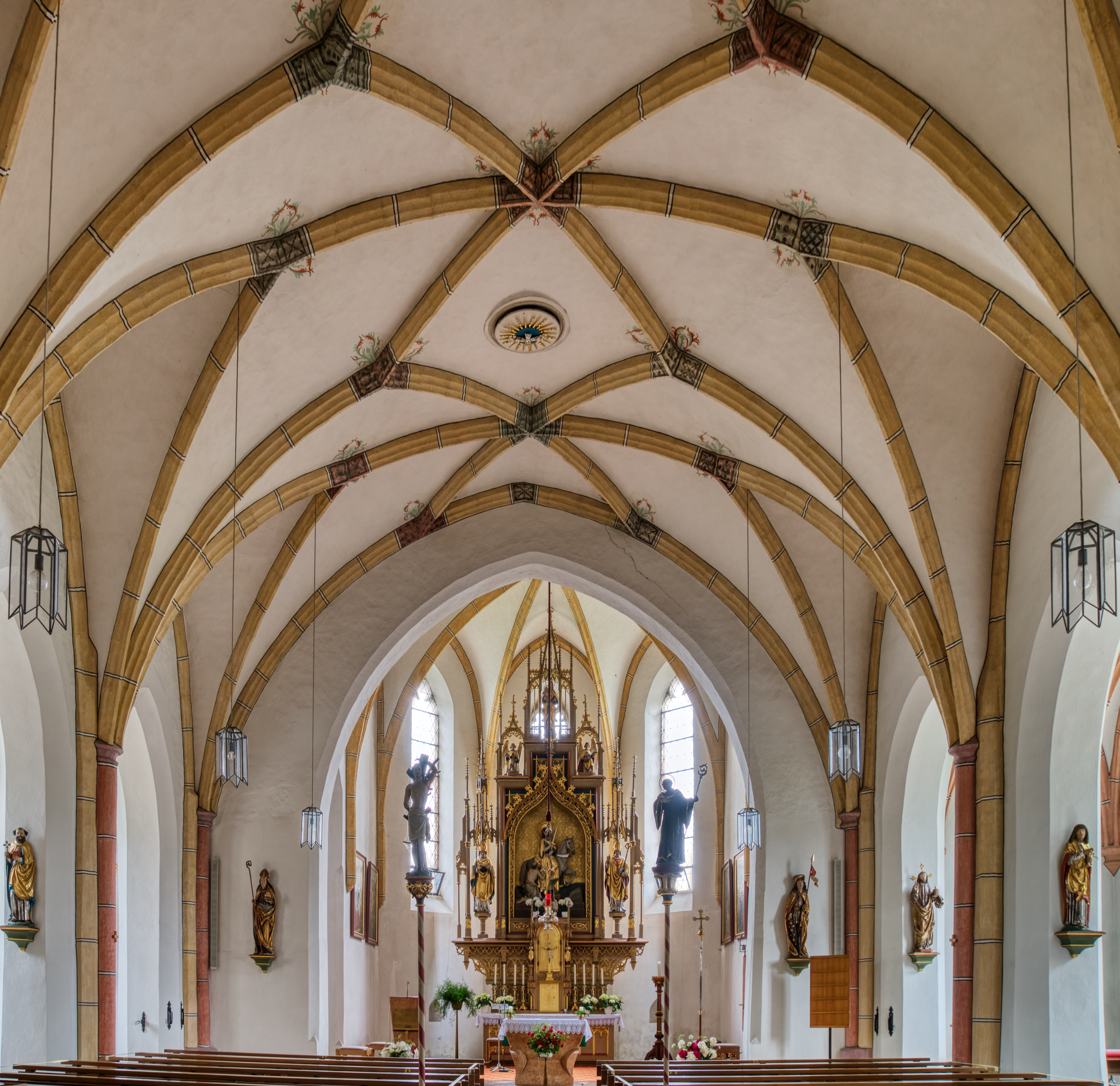 Katholische Pfarrkirche St Martin Weihmörting, Blick vom Langhaus zum Chor